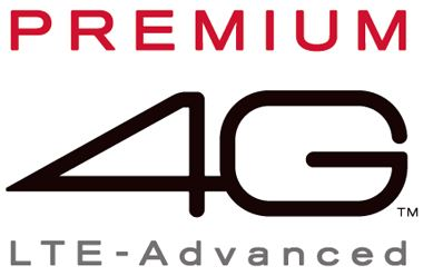 NTTドコモのPREMIUM 4Gのロゴ